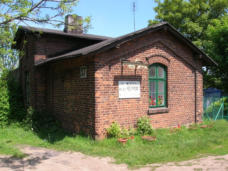 Domek Reymonta.